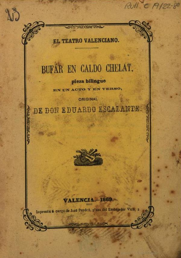 Portada de un sainete de Eduardo Escalante Mateo